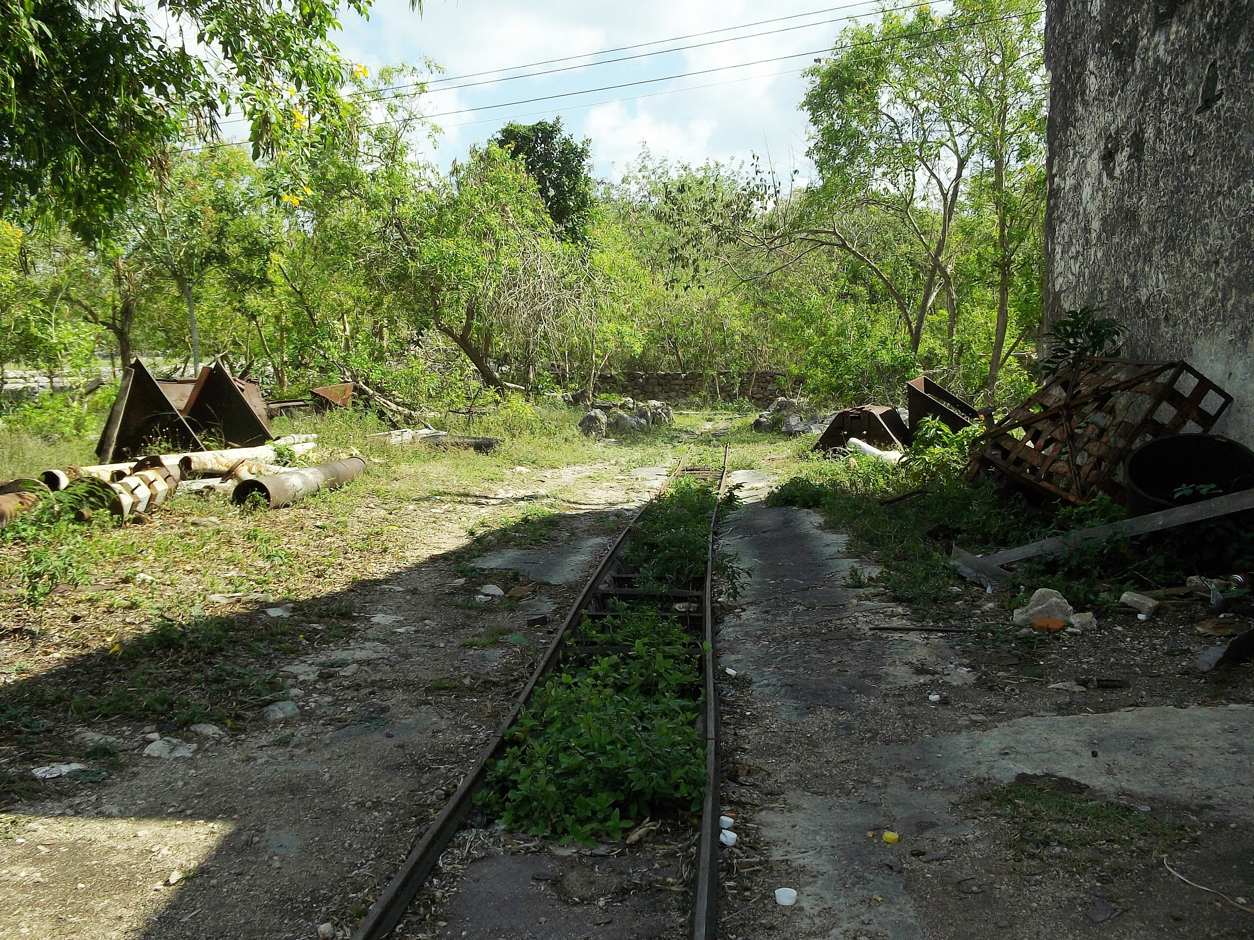 Via abandonada en la antigua hacienda de Aké, Yucatán.